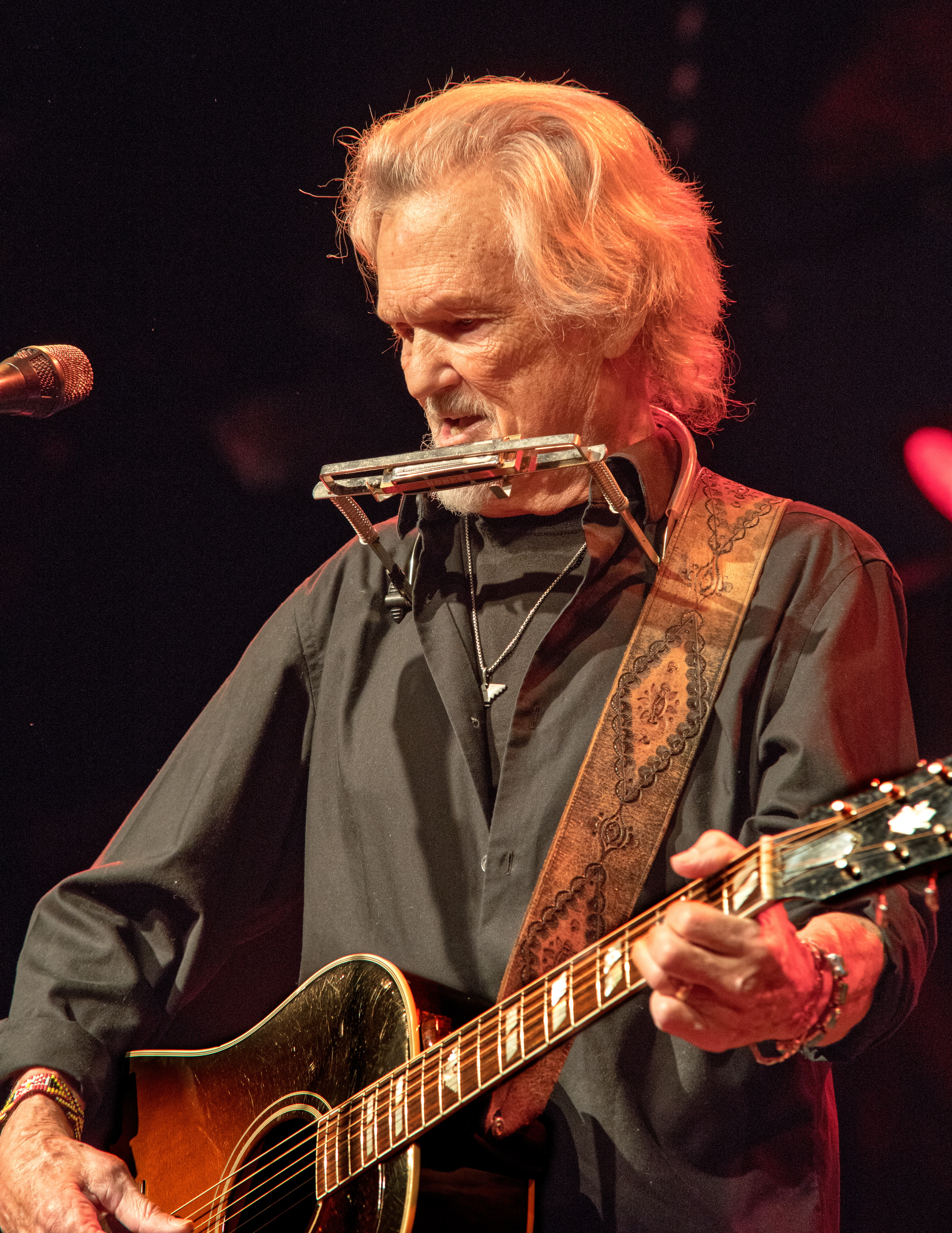 Bilder vom Zelt Musik Festival 2017 in Freiburg im Breisgau Kris Kristofferson